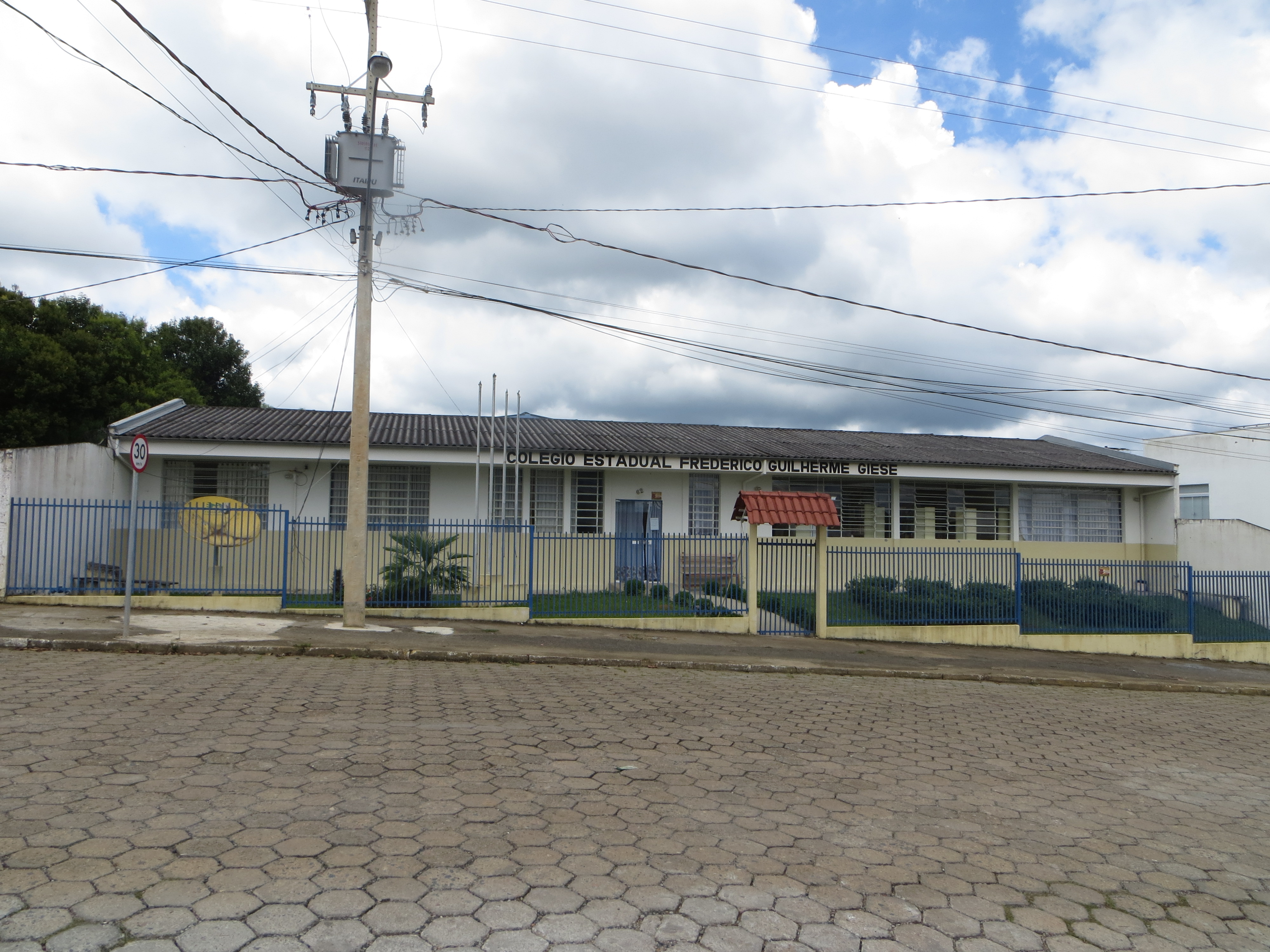 Colégio Estadual Frederico Guilherme Giese em Piên, Estado do Paraná, Região Sul do Brasil.